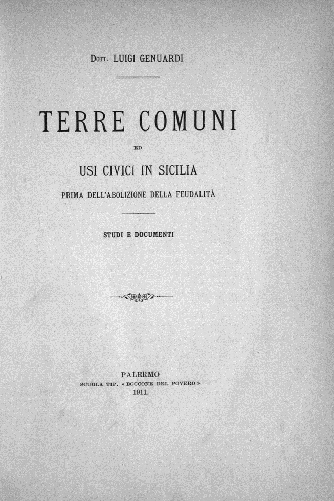 Frontespizio